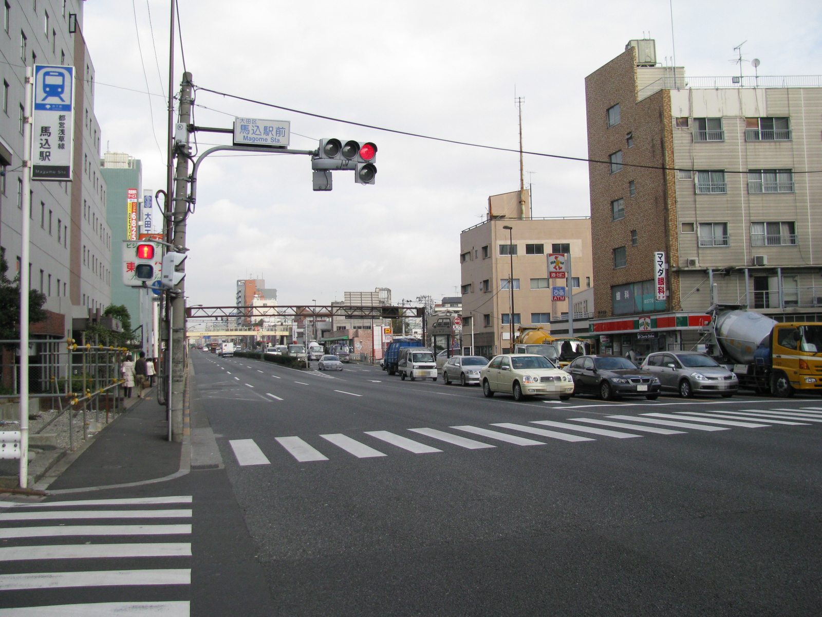 都営地下鉄浅草線馬込駅駅前風景